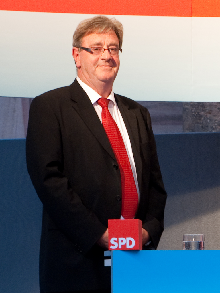 Marburgs Bürgermeister Egon Vaupel bei einer Wahlkampfveranstaltung